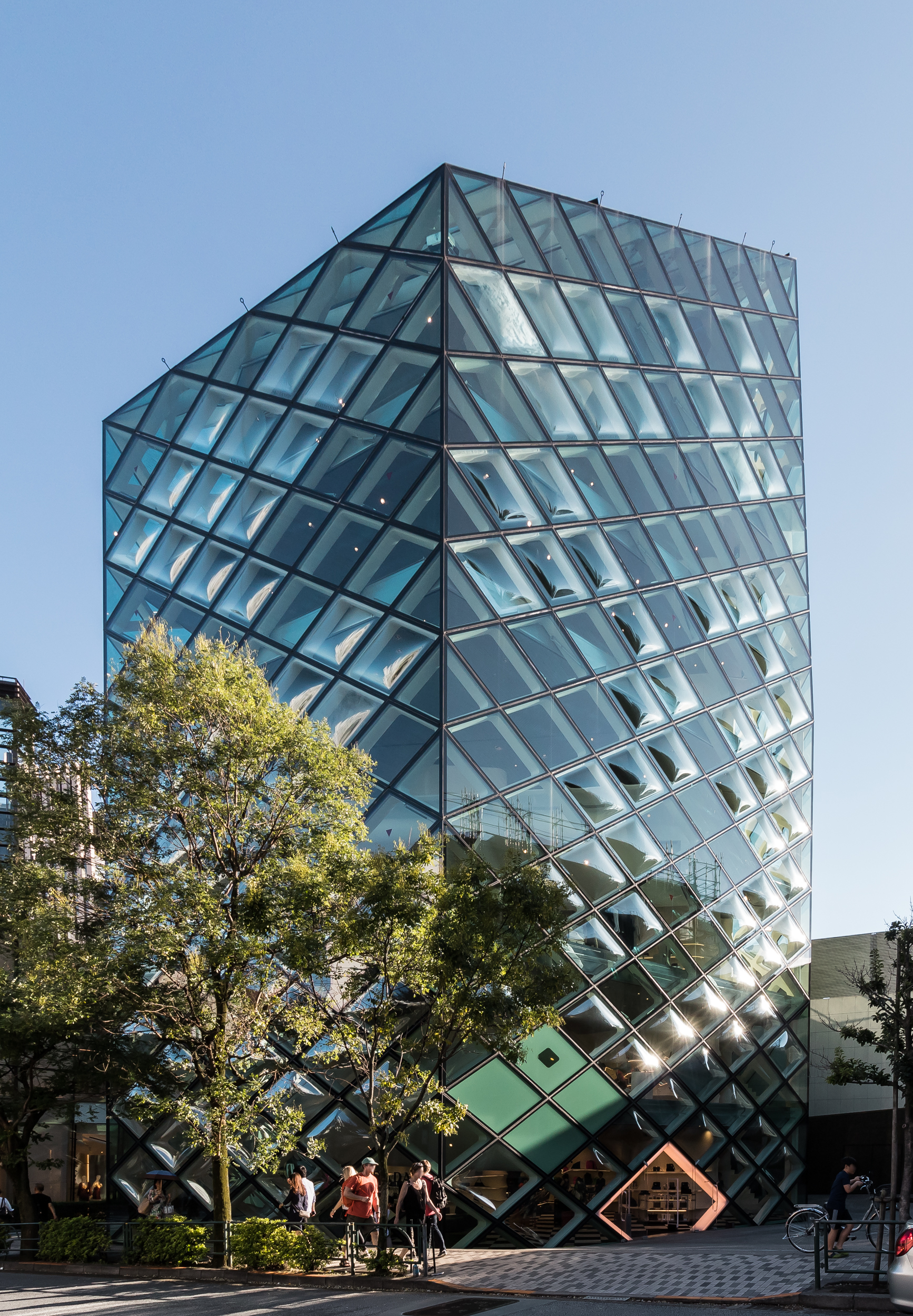 プラダ青山店。ヘルツォーク&ド・ムーロン設計。